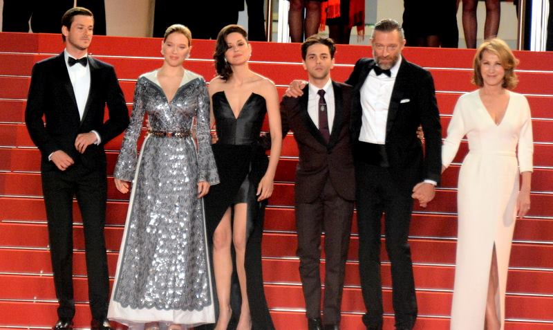 Présentation du film "Juste la fin du monde" au festival de Cannes : Gaspard Ulliel, Léa Seydoux, Marion Cotillard, Xavier Dolan, Vincent Cassel, Nathalie Baye.